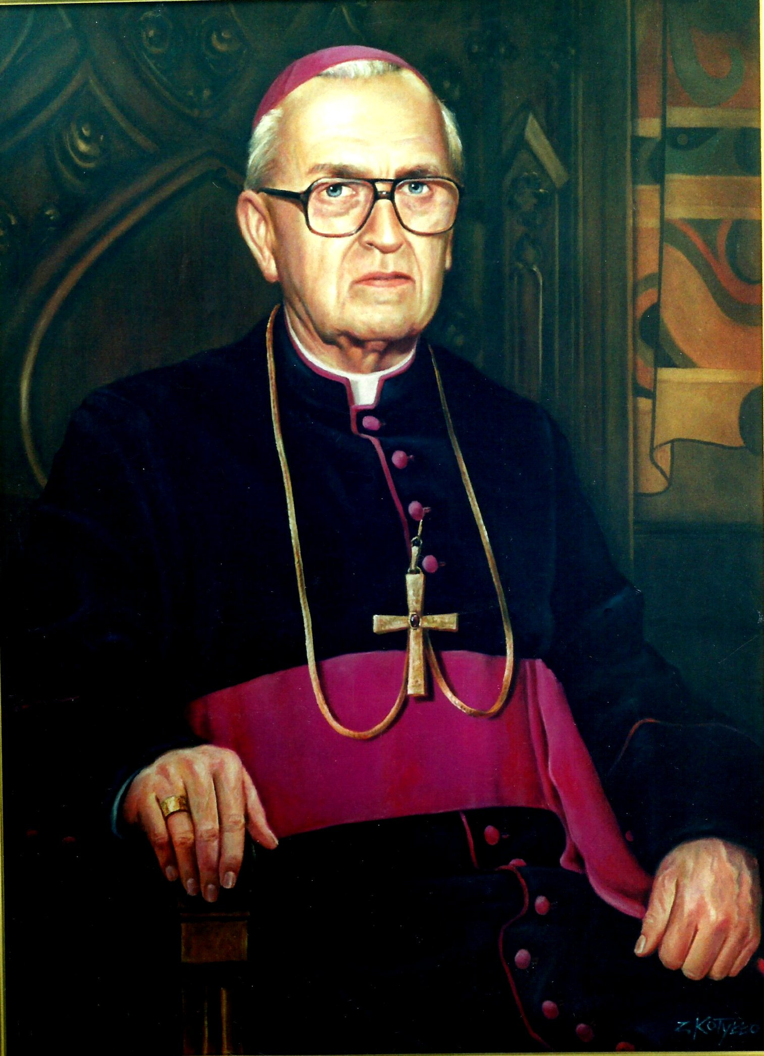 Bp Edward Materski Obraz malował Zbigniew Kotyłło